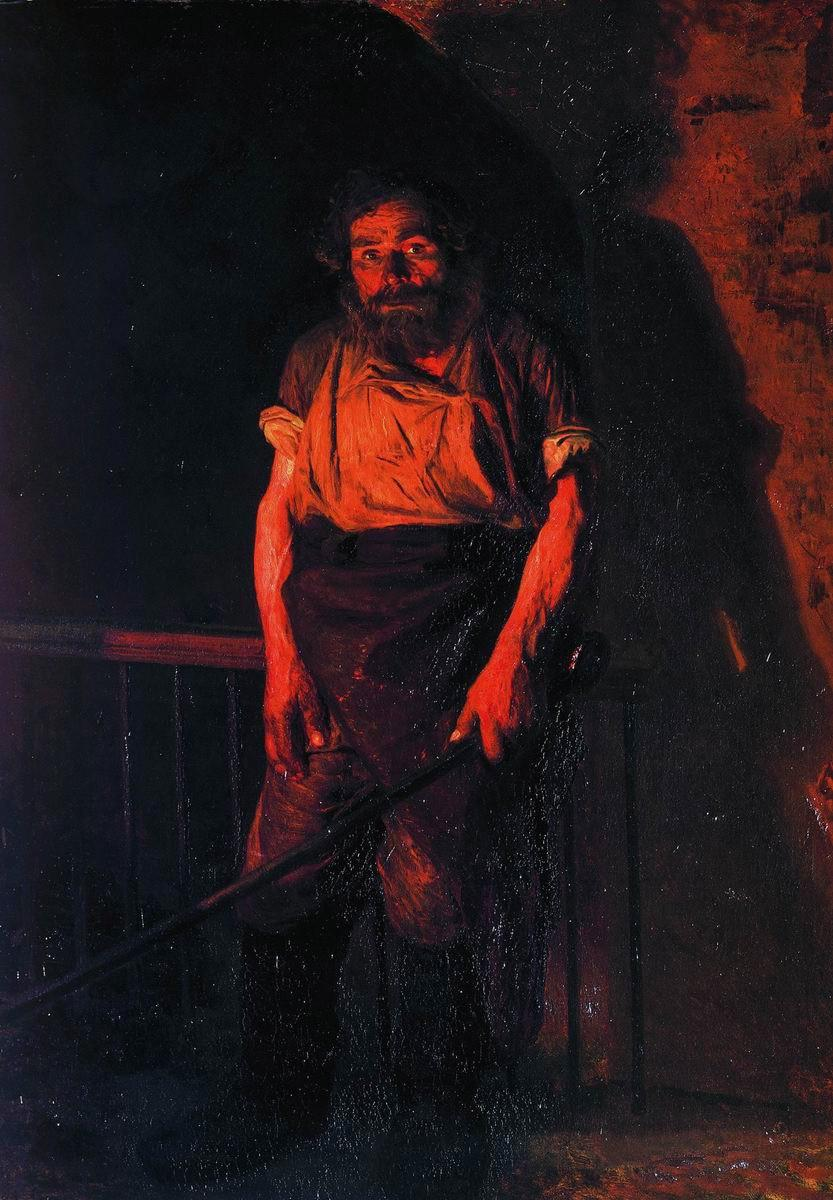 Кочегар